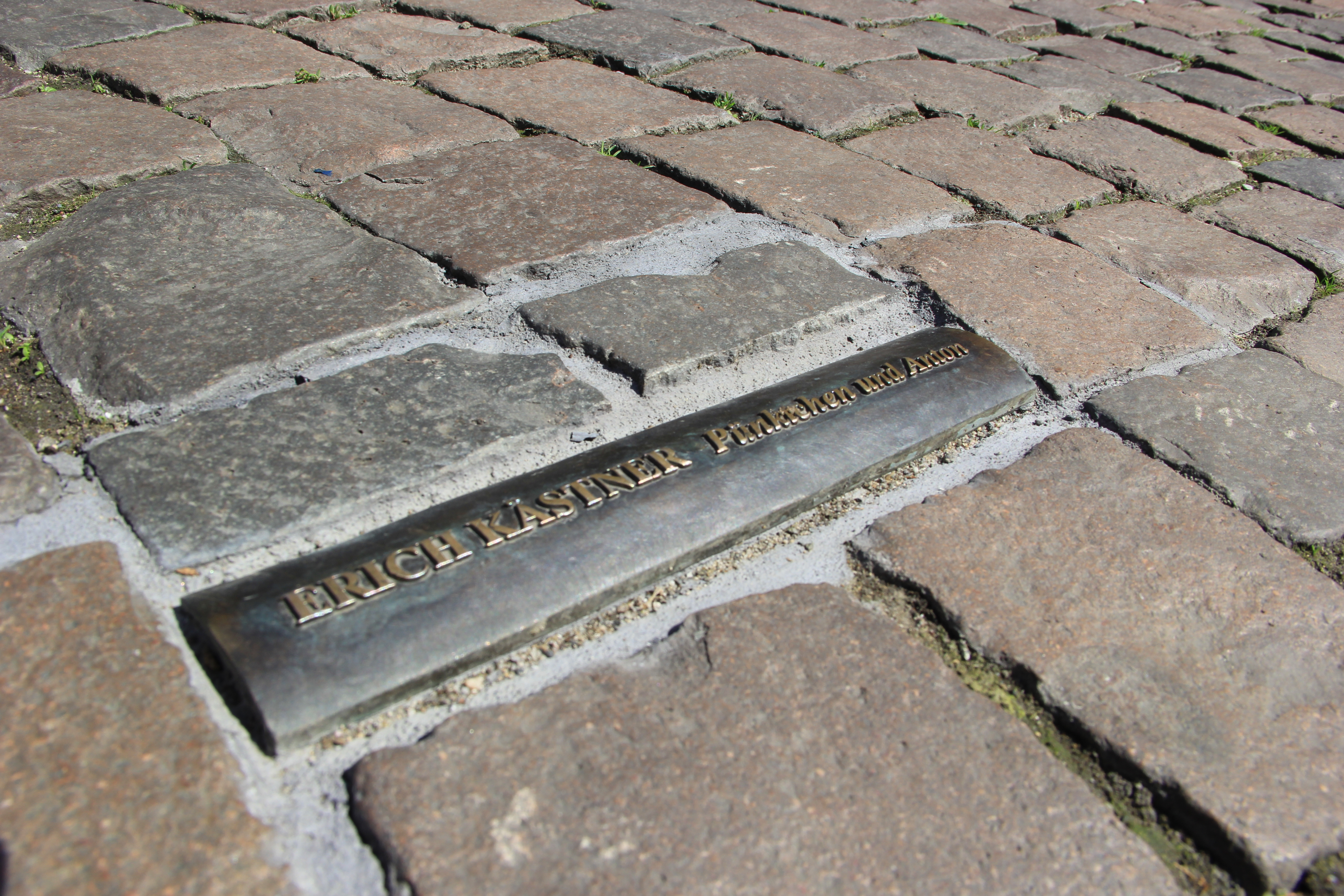 Das Mahnmal zur Bücherverbrennung auf dem Bonner Markt; In das Pflaster des Bonner Markt sind insgesamt 60 sichtbare Buchrücken, sogenannte „Lesezeichen“, verteilt, die sich an der Rathaustreppe, dem Ort an dem die Bücher am 10. Mai 1933 verbrannt wurden, verdichten. Zusätzlich wurde ein wetterfester Archiv-Behälter in Form einer Büchertruhe in den Platz eingelassen. Seine Inschrift benennt das Ereignis und weitere Autoren von verbrannten Büchern.